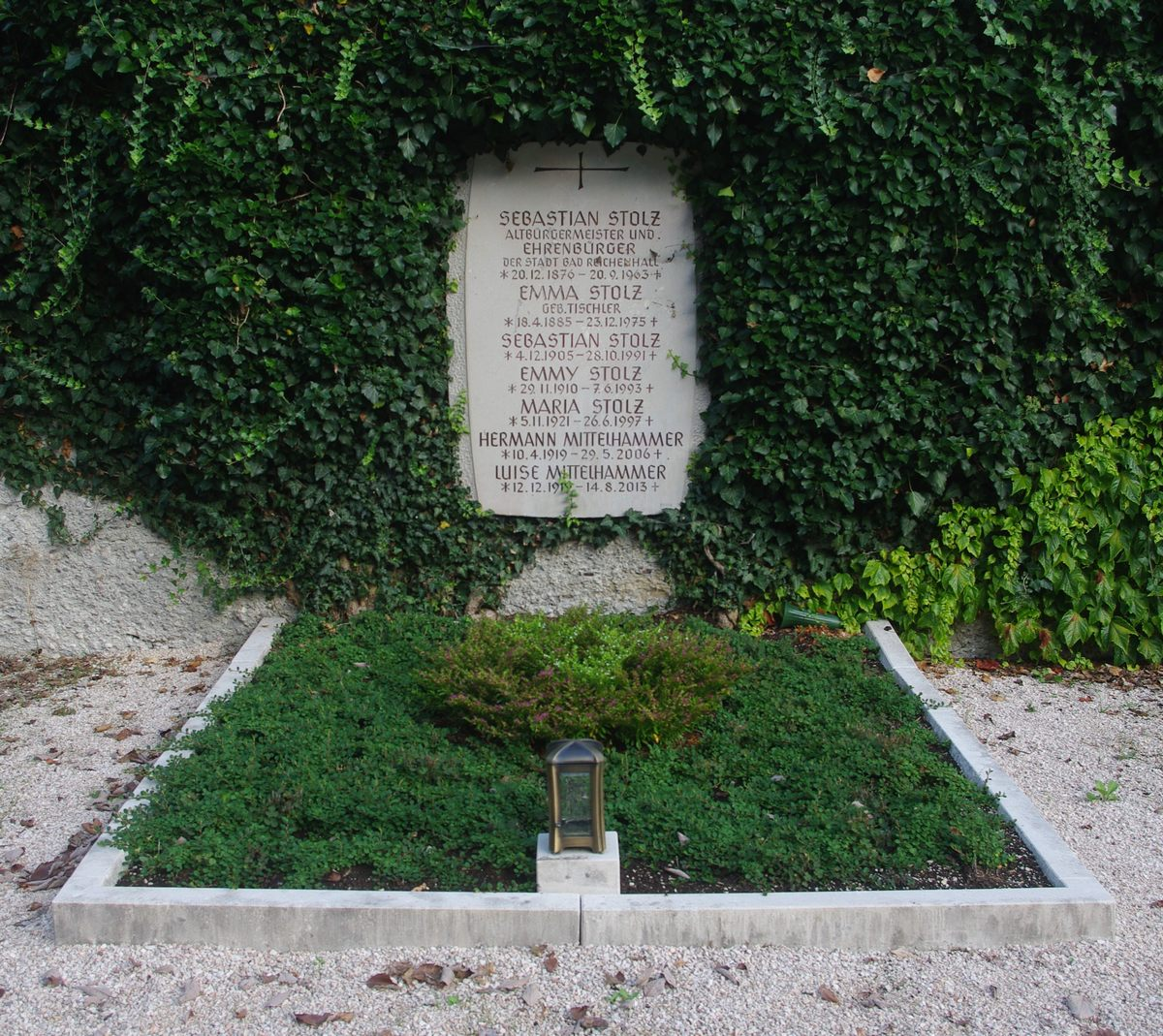 Grabstelle Fam. Sebastian Stolz auf dem Friedhof St. Zeno in 83435 Bad Reichenhall